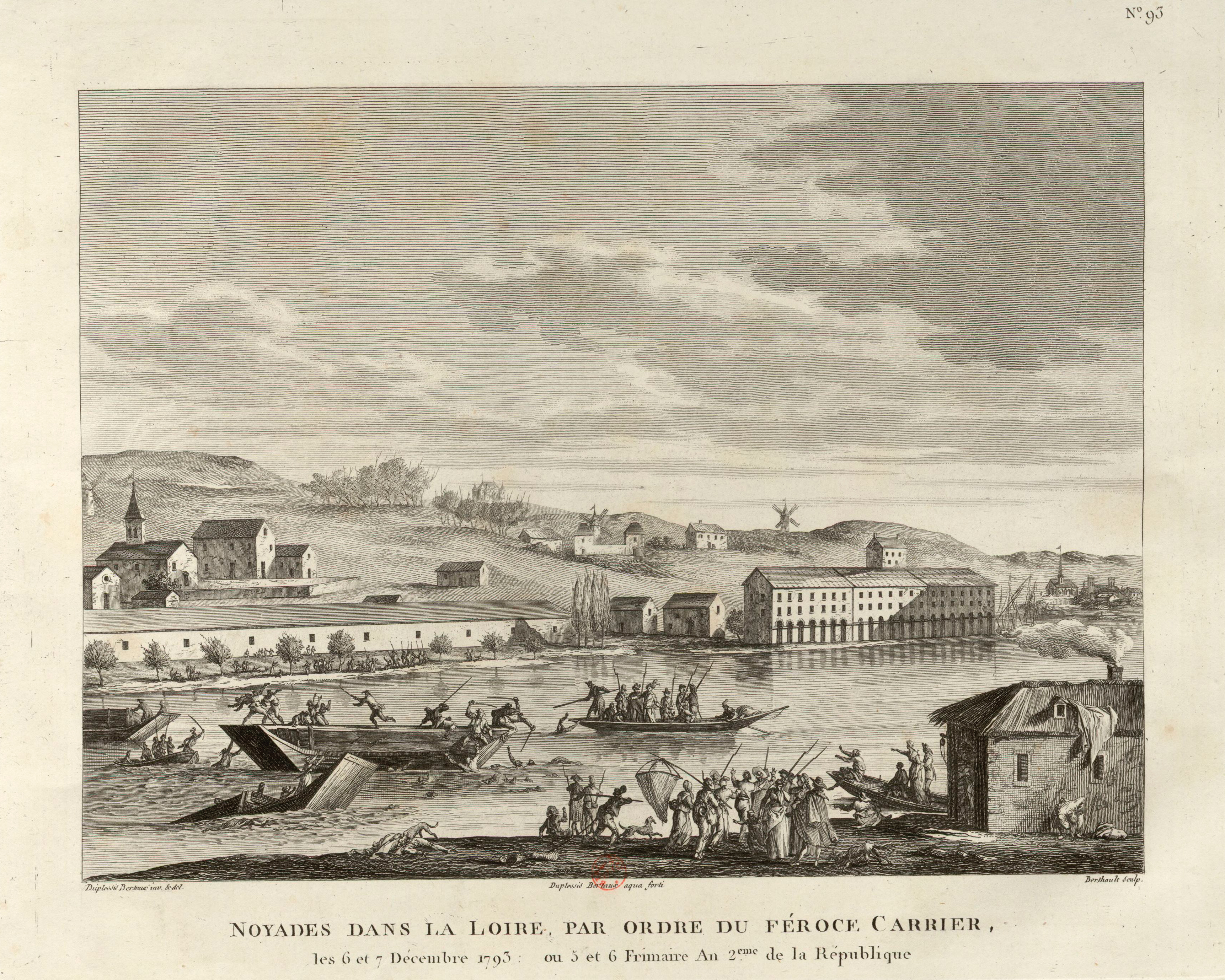 Noyades de Nantes. Tableau nº 93, extrait de la Collection complète des tableaux historiques de la Révolution française.